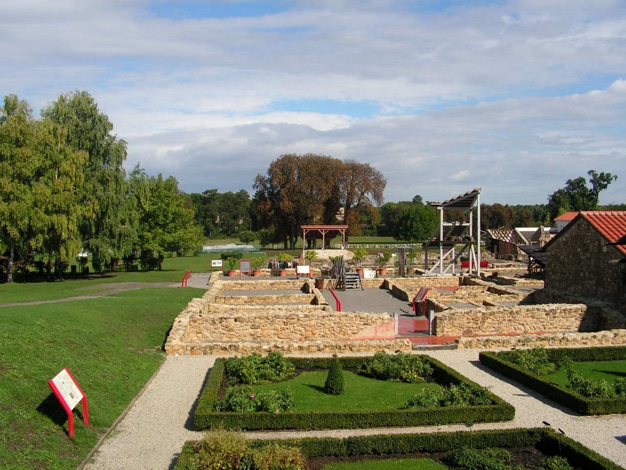 Carnuntum, Freilichtmuseum Petronell Dieses Bild wurde anlässlich des österreichischen Tags des Denkmals 2012 in Niederösterreich eingereicht.